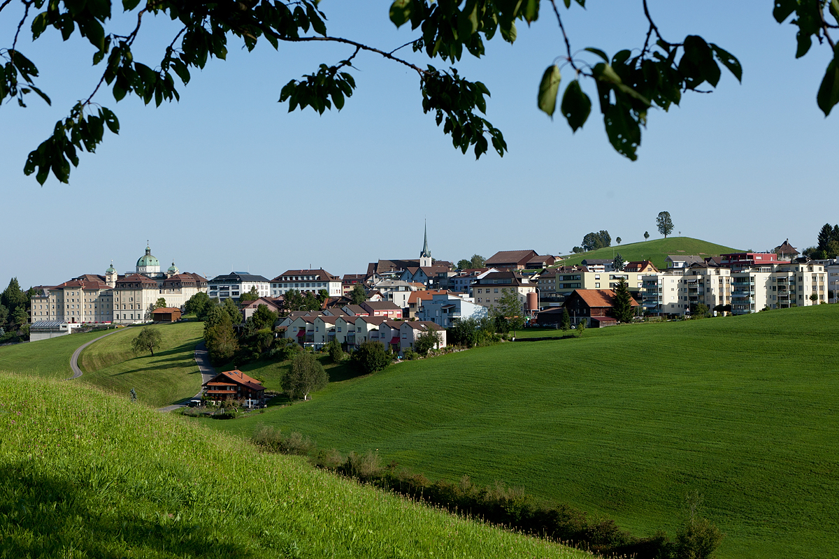 Menzingen von Südosten her gesehen